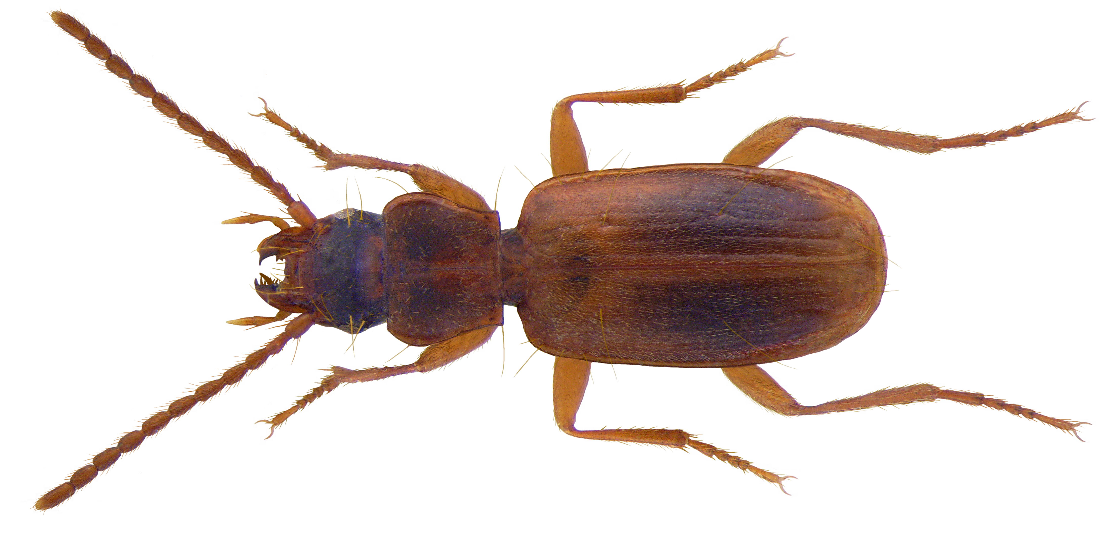 Familie: Carabidae Grösse: 4-5 mm Verbreitung: Europa, Nord-Asien, verstreut und selten Ökologie: im Sommer in Hochwassergenisten Fundort: England, R. Lym Brockenhurst leg.det. J.M.Walters, 2005 Foto: U.Schmidt, 2009